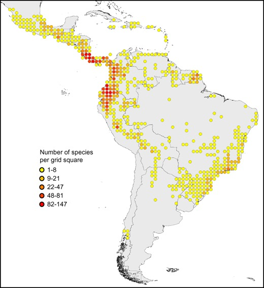 Distribuição e riqueza de espécies de Gesneriaceae no Novo Mundo com base em 48.000 ocorrências compiladas a partir do portal de dados do GBIF ( novembro de 2011), Perret et al. (2006) e dados não publicados (A. Chautems). Observe a distribuição centrada nos Andes com uma concentração de espécies no norte dos Andes e na América Central e o centro secundário de diversidade na floresta atlântica brasileira. Ocorrências nos Andes temperados do Chile correspondem a espécies de Coronanthereae.